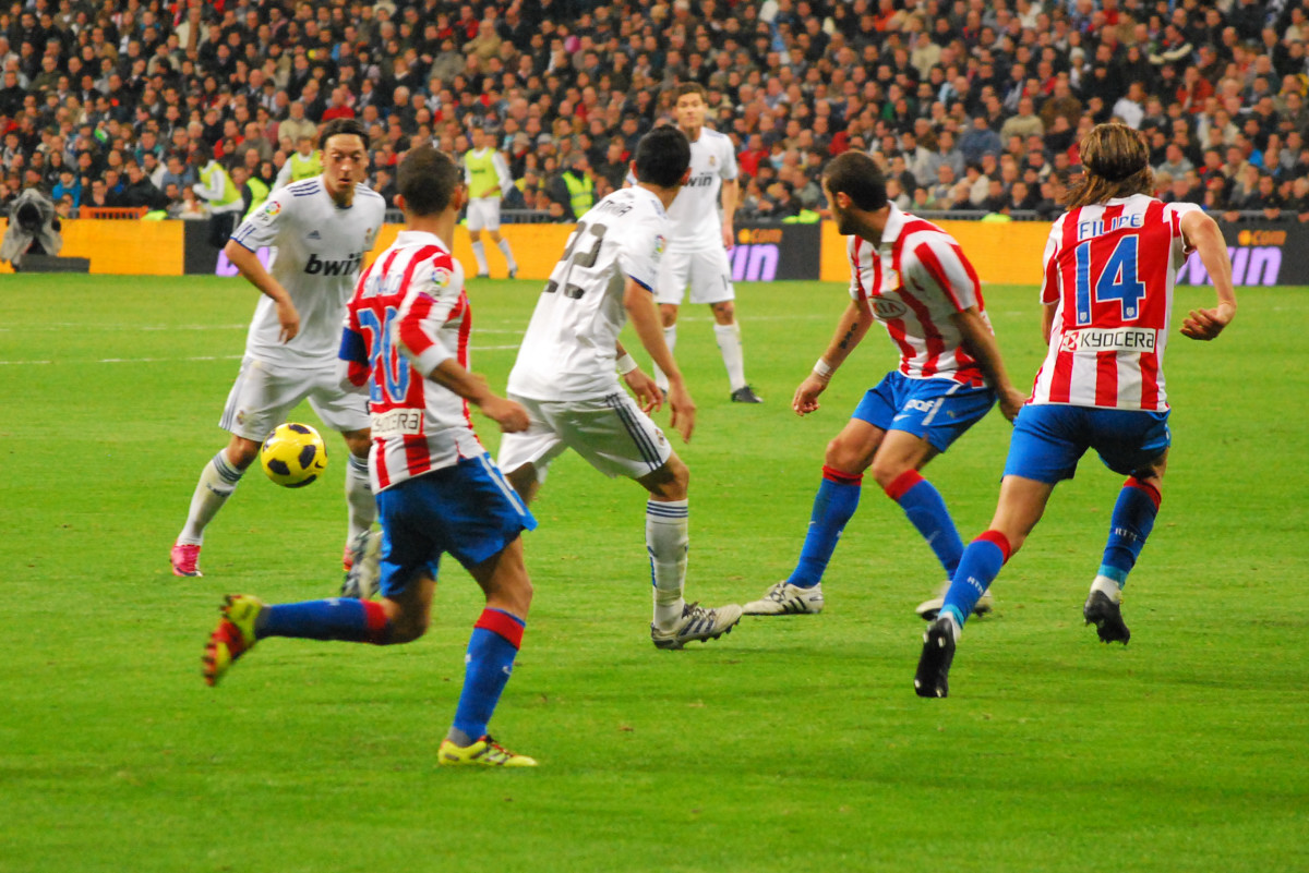 La Liga: Real Madrid 2 - Atletico 0 7 de Noviembre 2010